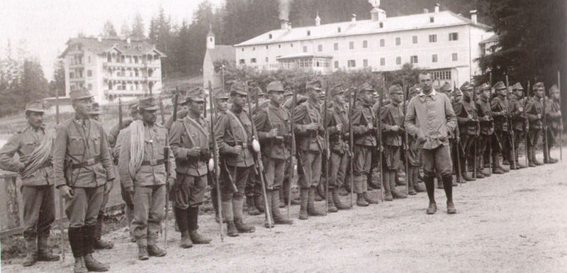 k.u.k. Hochgebirgskompanie etwa 1917 in Alt-Prags (heute: Bagni di Braies Vecchia - Pragser Tal)